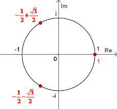 Una representación en el plano complejo de las raíces cúbicas de 1.